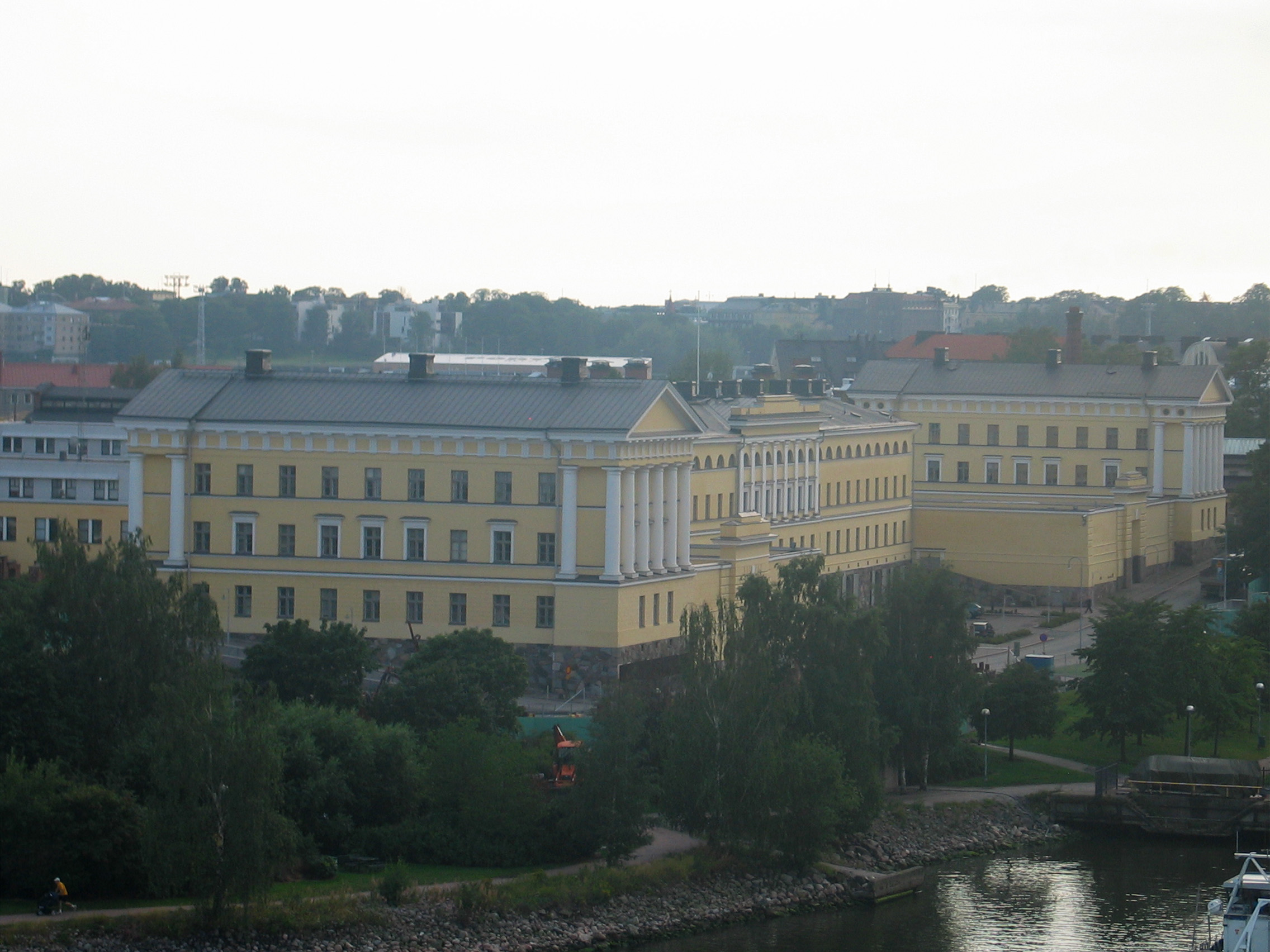 Merikasarmi, Katajanokka, Finland